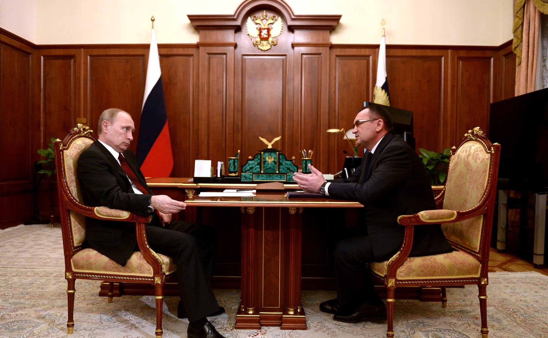 Владимир Путин и Николай Фёдоров